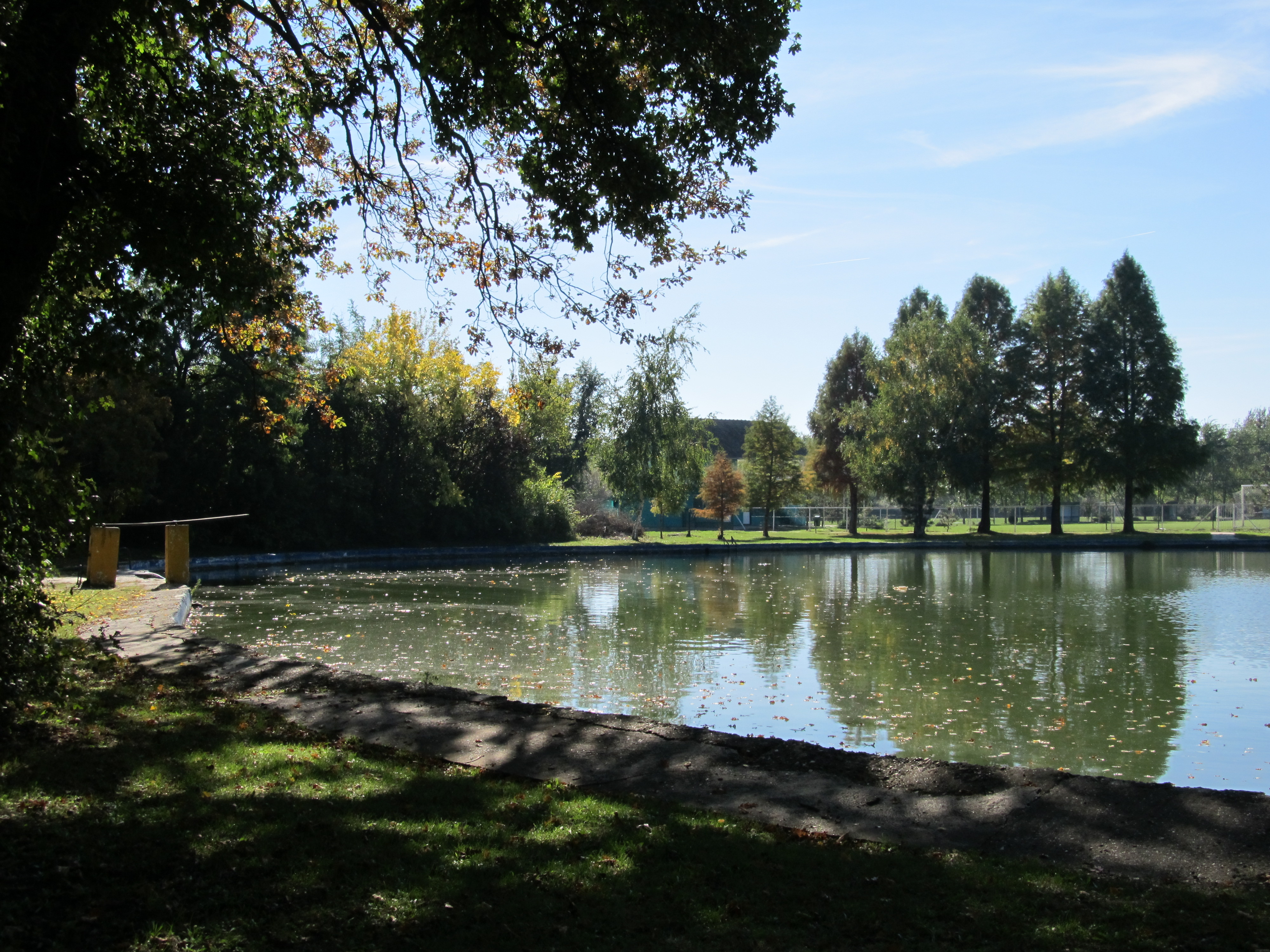 Данашњи изглед језера које се налази у оквиру комплекса дворца Дамаскин у Хајдучици